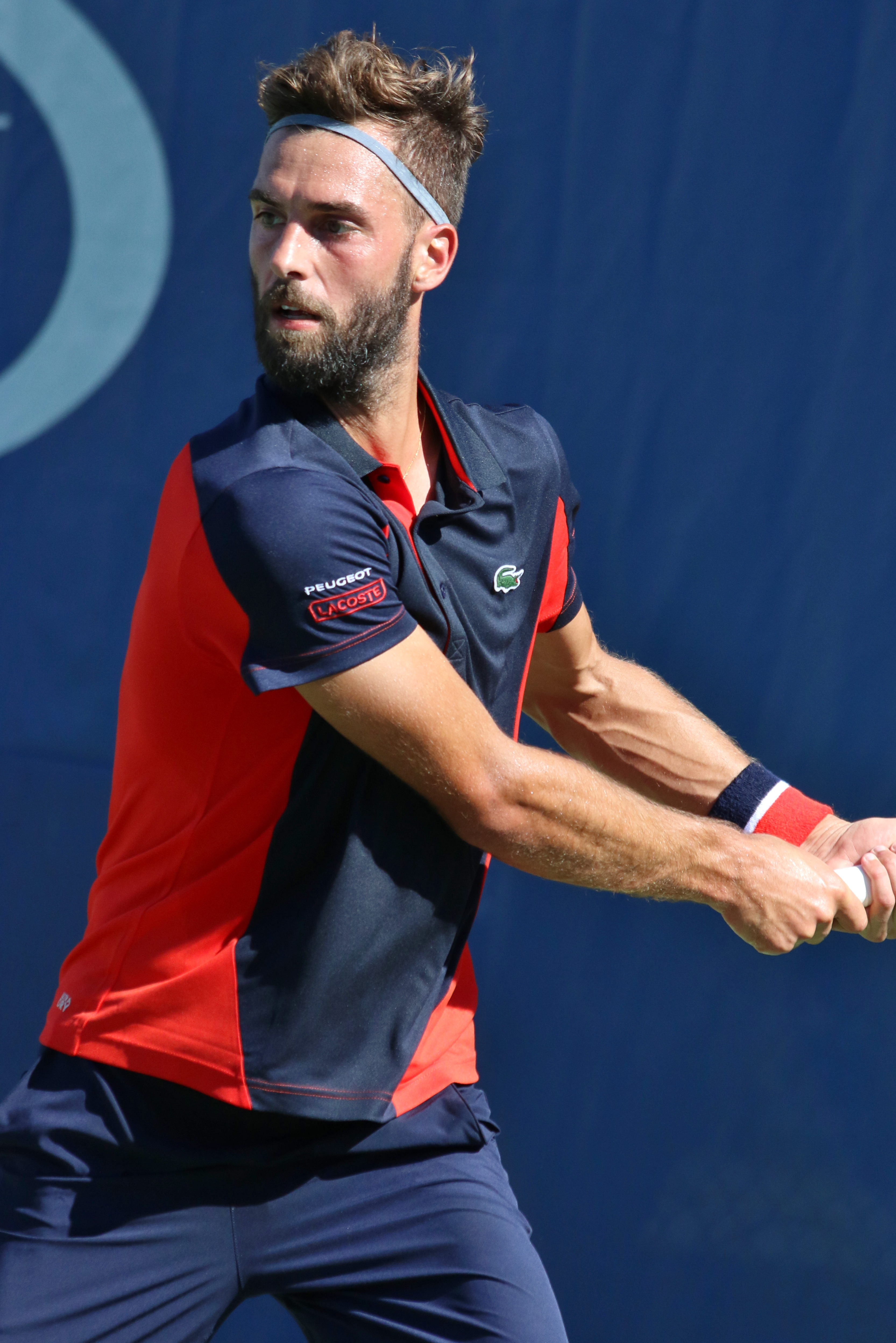 Paire US16 (12)